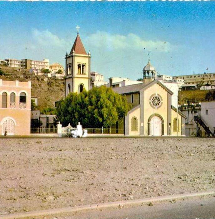 الكنيسة الكاثولوكية في عدن